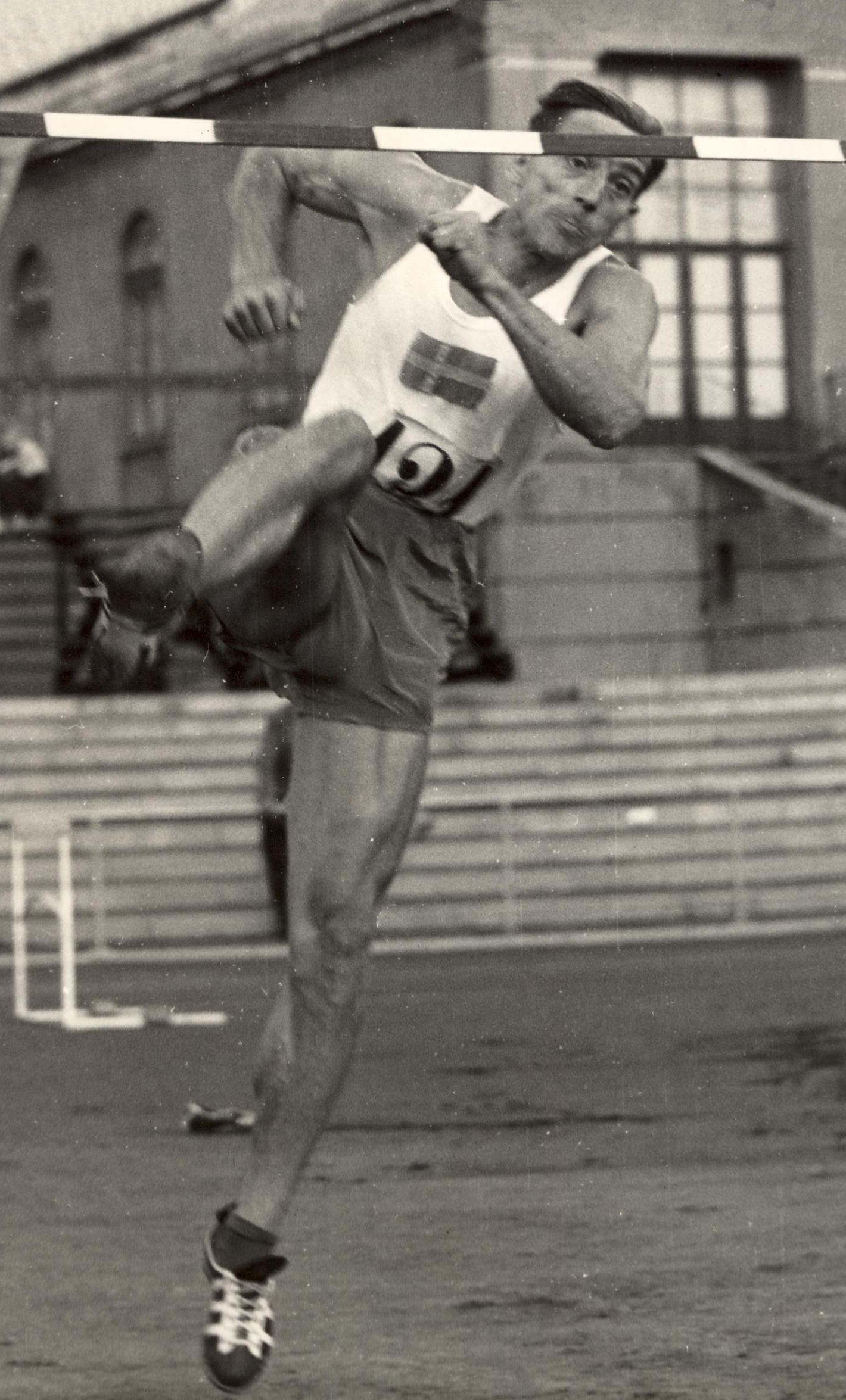 Per Eriksson (decathlete)